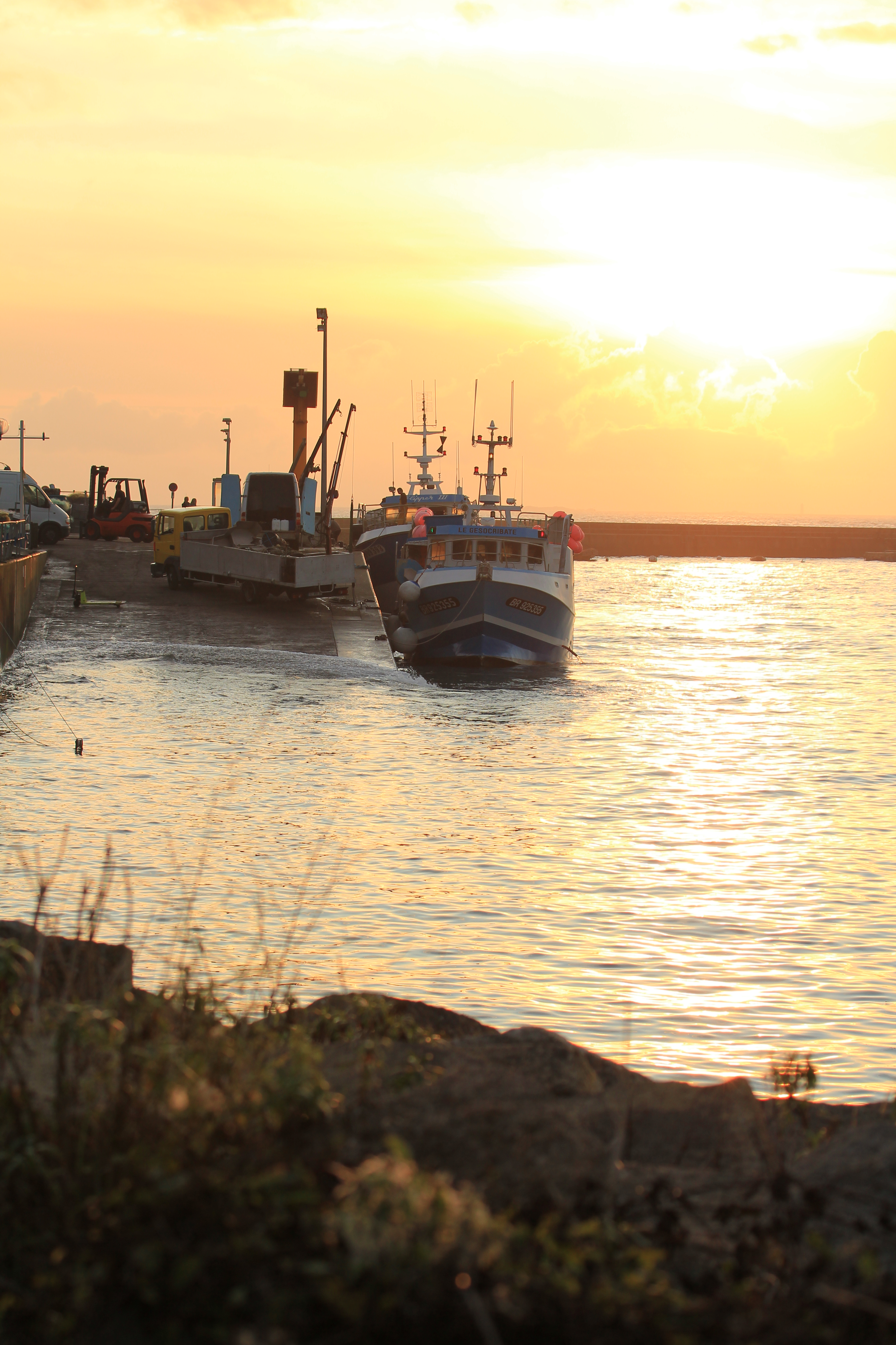 Débarquement de la pêche au port du Conquet en fin de journée